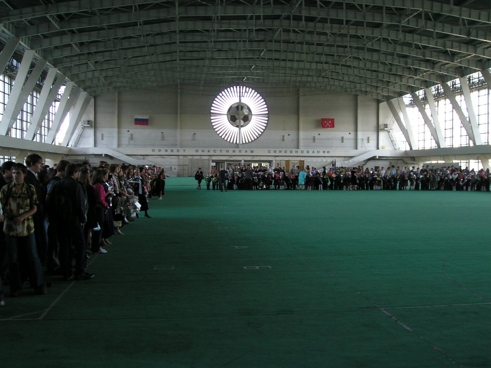 Дворце спортивных игр Зенит (вид изнутри)